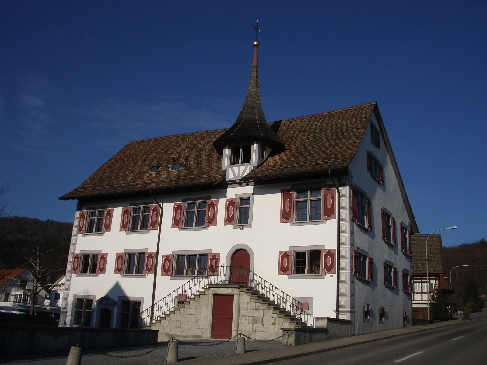 Weiningen ZH, Switzerland